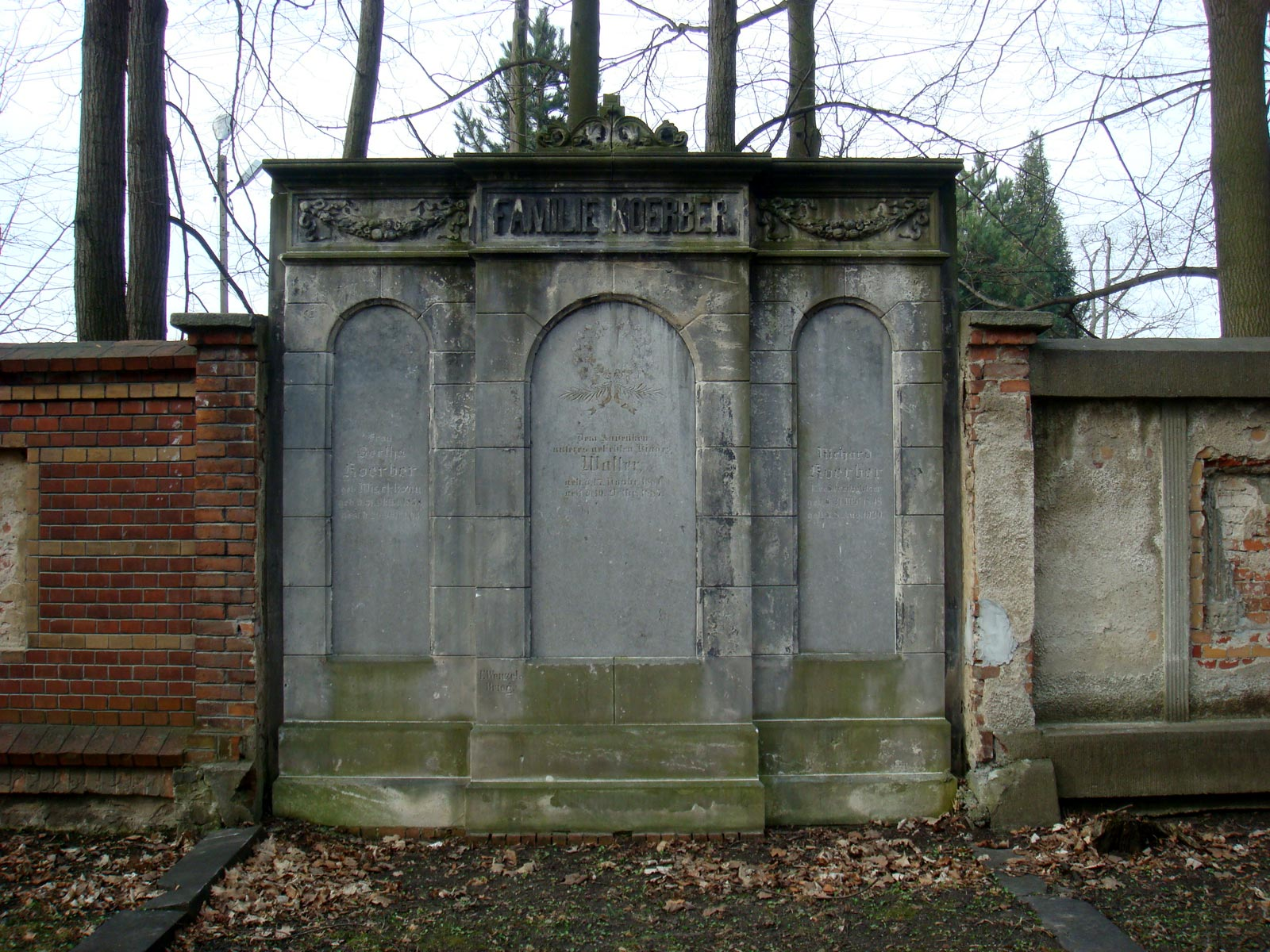 Grobowiec rodziny Koerbe na cmentarzu ewangelicko-augsburskim przy ul. Wrocławskiej w Opolu (mur zachodni).